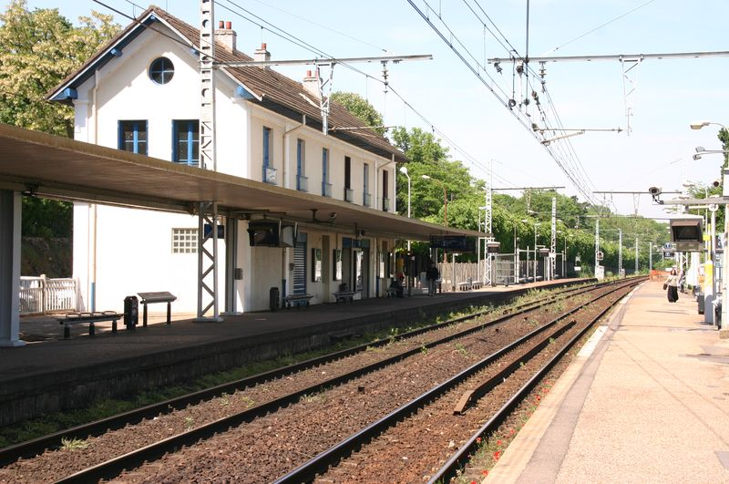 Gare d'Evry Val de Seine. Le batiment de la gare.